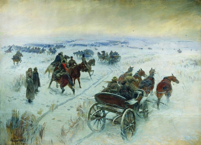 Бой при Егорлыкской. 1928-1929 Холст, масло. 178 x 250 см Центральный музей Вооруженных Сил